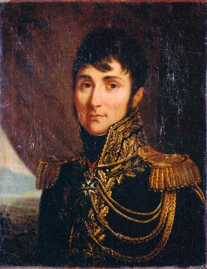 photo d'un tableau montrant le général Desvaux de Saint-Maurice (Jean-Jacques Desvaux de Saint-Maurice)